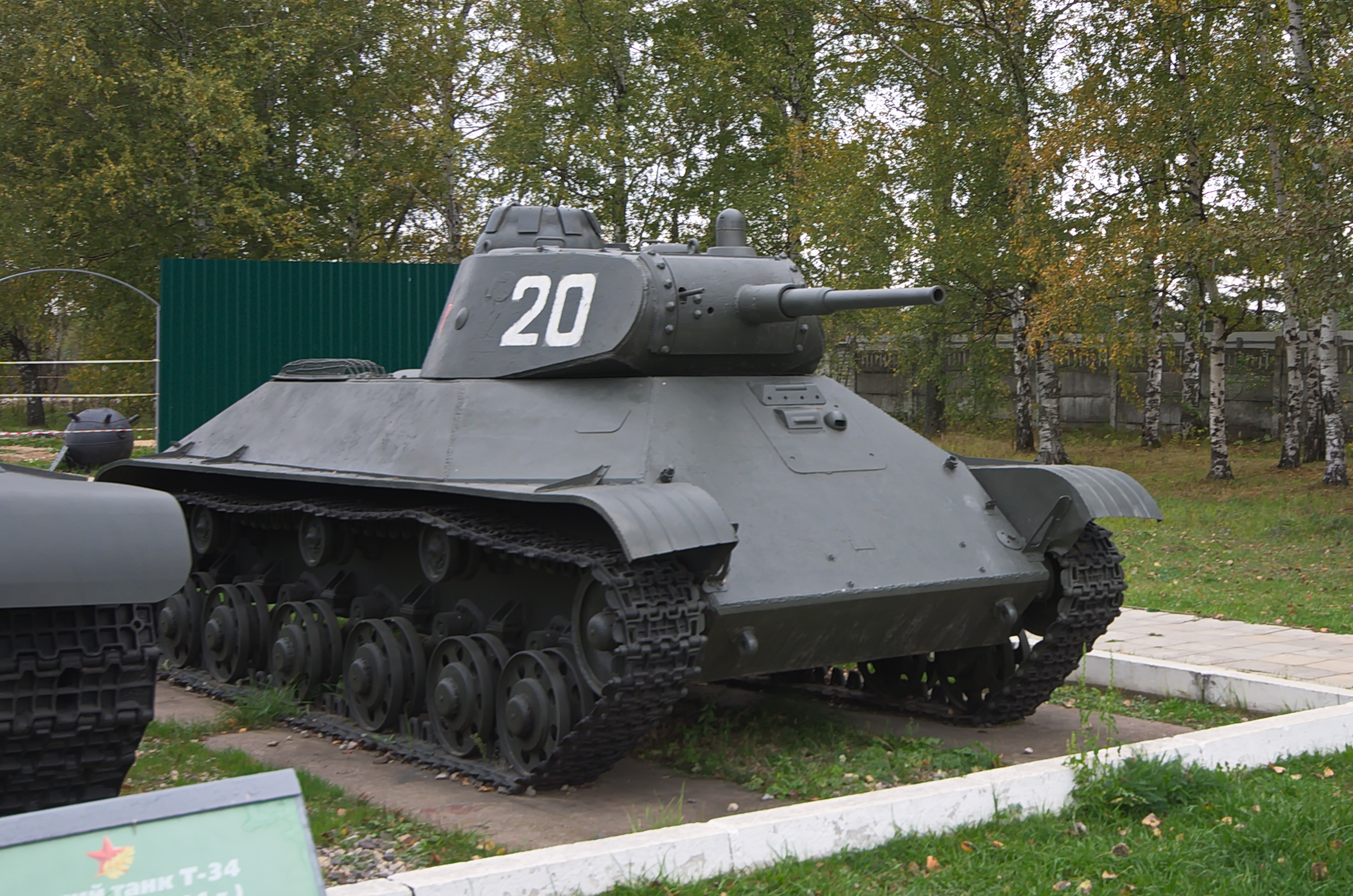 0452 - Moskau 2015 - Panzermuseum Kubinka